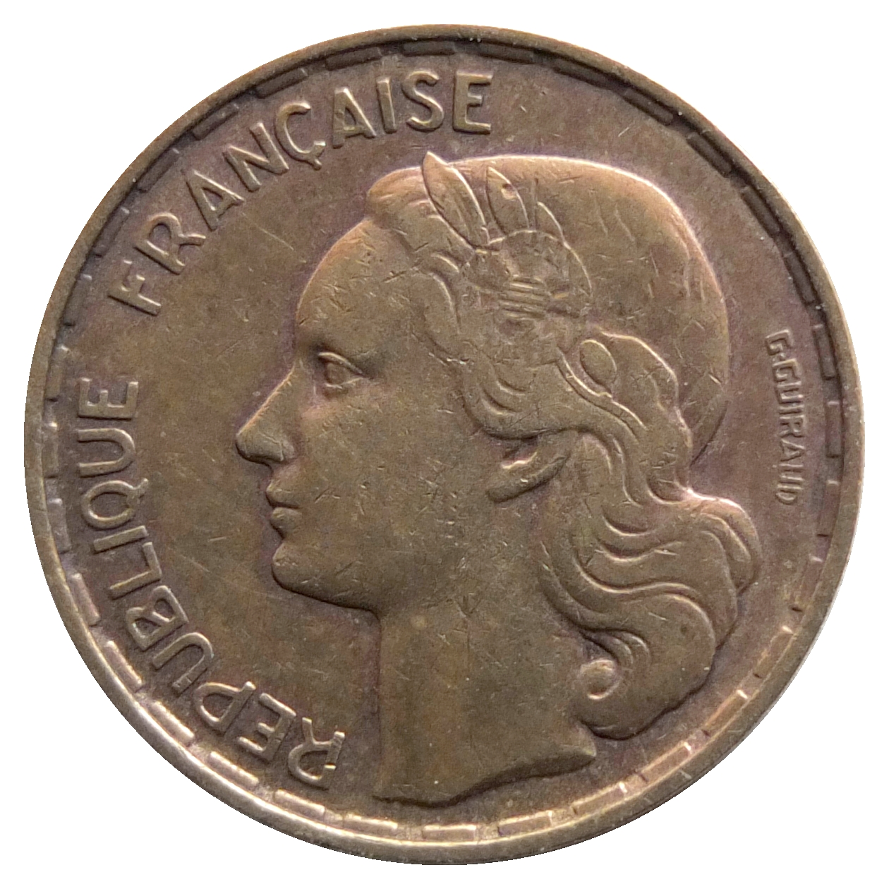 Pièce française 50 francs 1952, atelier 'B' (Beaumont-le-Roger). Graveur Georges Guiraud. Tirage 13 432 229 démonétsée le 1er février 1967. Diamètre 27 mm, poids 8 g. Cupro-aluminium.